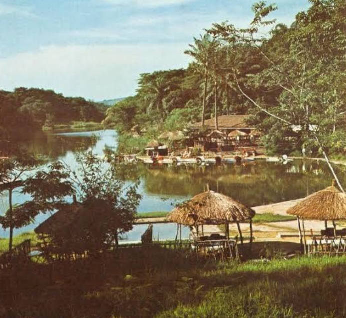 Le lac Ma Vallée dans les années 70